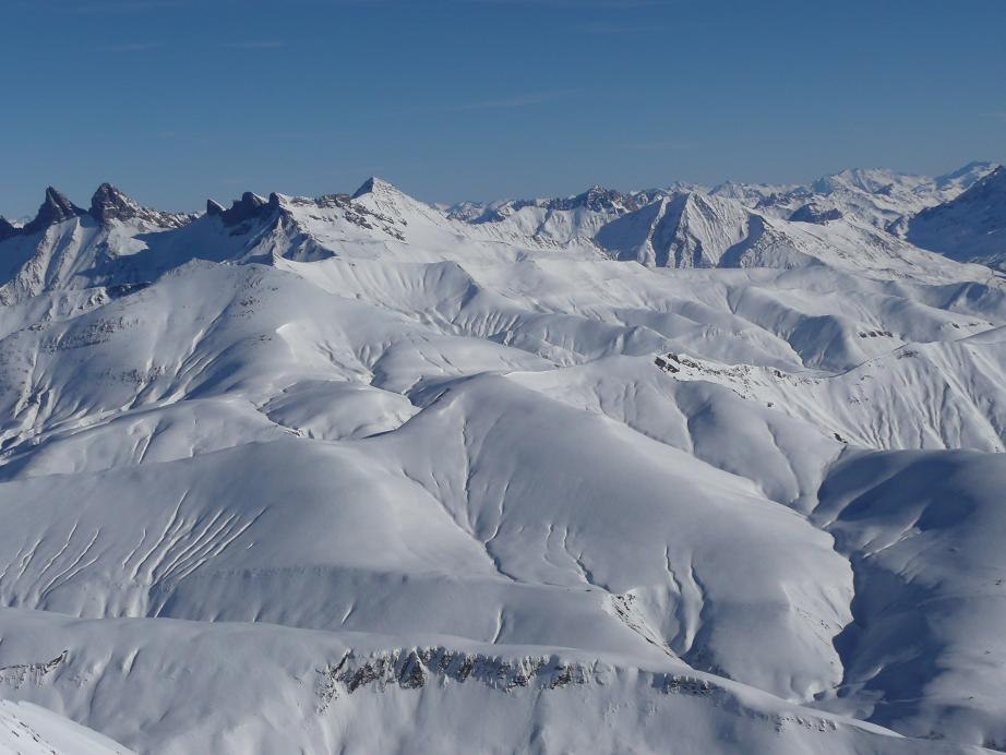 Vue depuis l'Alpe d'Huez vers l'est, Massif des Arves, Aiguilles de la Saussaz, Aiguille du Goléon, Pic des Trois Évêchés